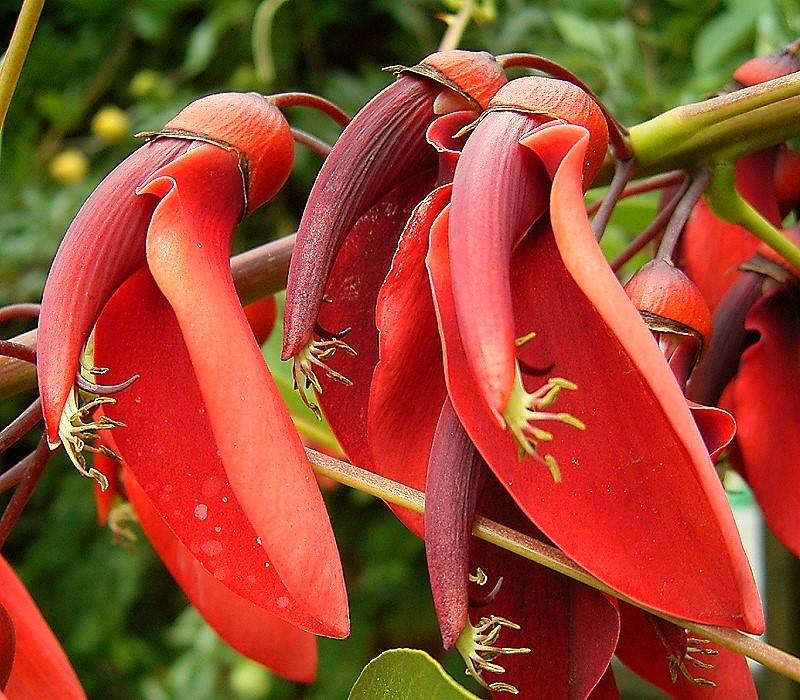 Erythrina crista-galli